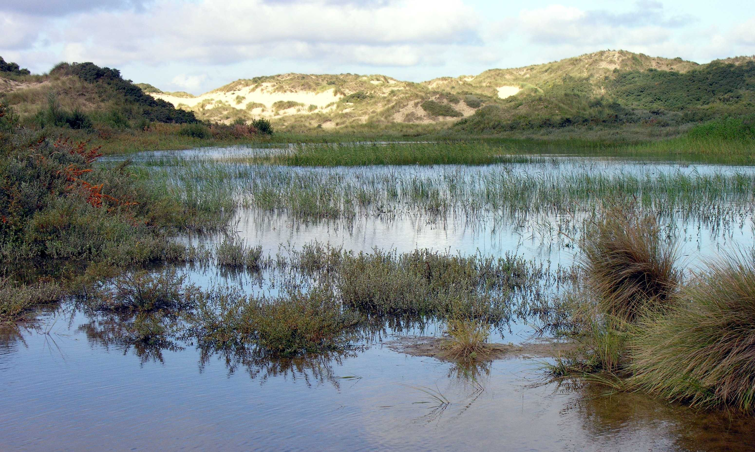 Duinpanne "Het Zwarte Dal" in het Westhoekreservaat,De Panne